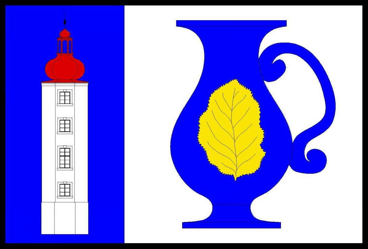 Vlajka obce Bukovany